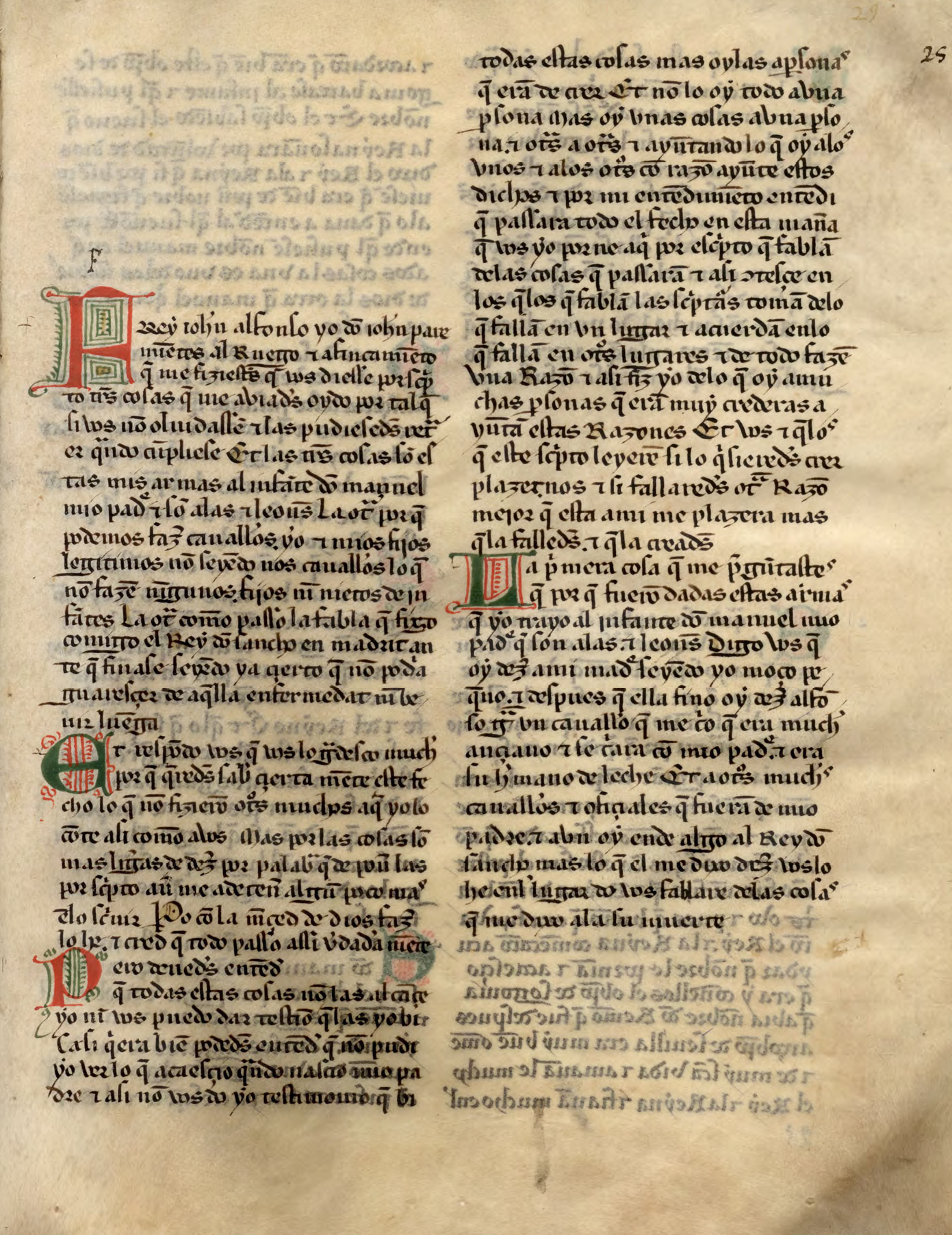 Íncipit del Libro de las tres razones, obra escrita en el siglo XIV por el célebre magnate Don Juan Manuel (1282-1348), hijo del infante Manuel de Castilla y nieto del rey Fernando III el Santo. MSS/6376 de la Biblioteca Nacional de España, fol. 25r. Empieza: Frey Johan Alfonso, yo, don Johan, pare mientes al ruego et afincamiento Ref